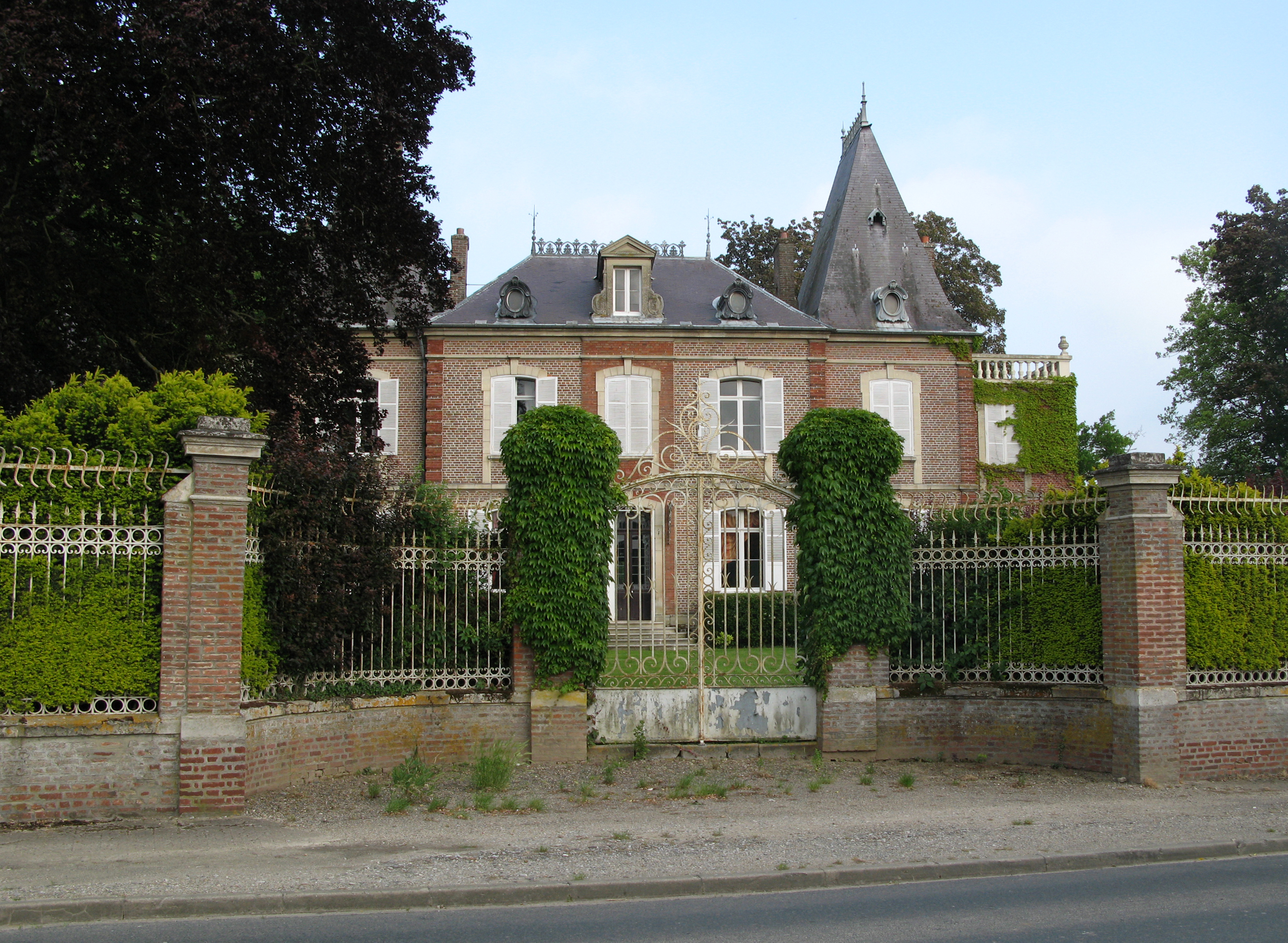 Lœuilly (Somme, France) - Le château.